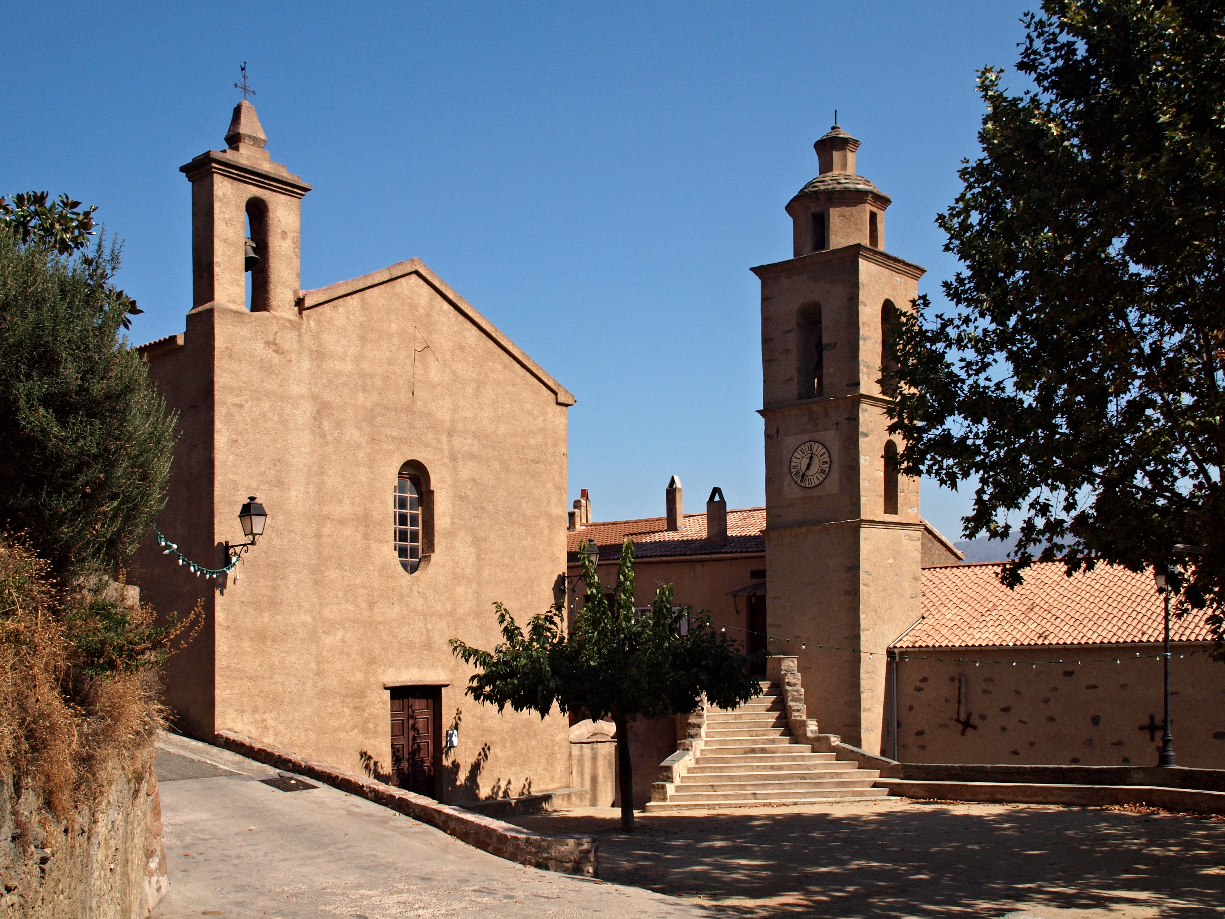 Castifao - Eglise St-Nicolas et Confrérie St-Antoine de Janvier